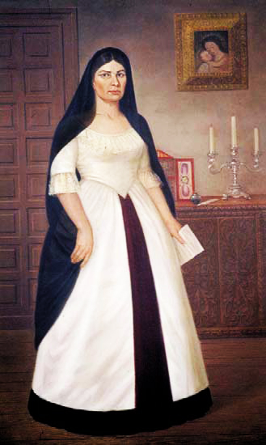 Retrato de María Parado de Bellido (1761 o 1777 - 1822)